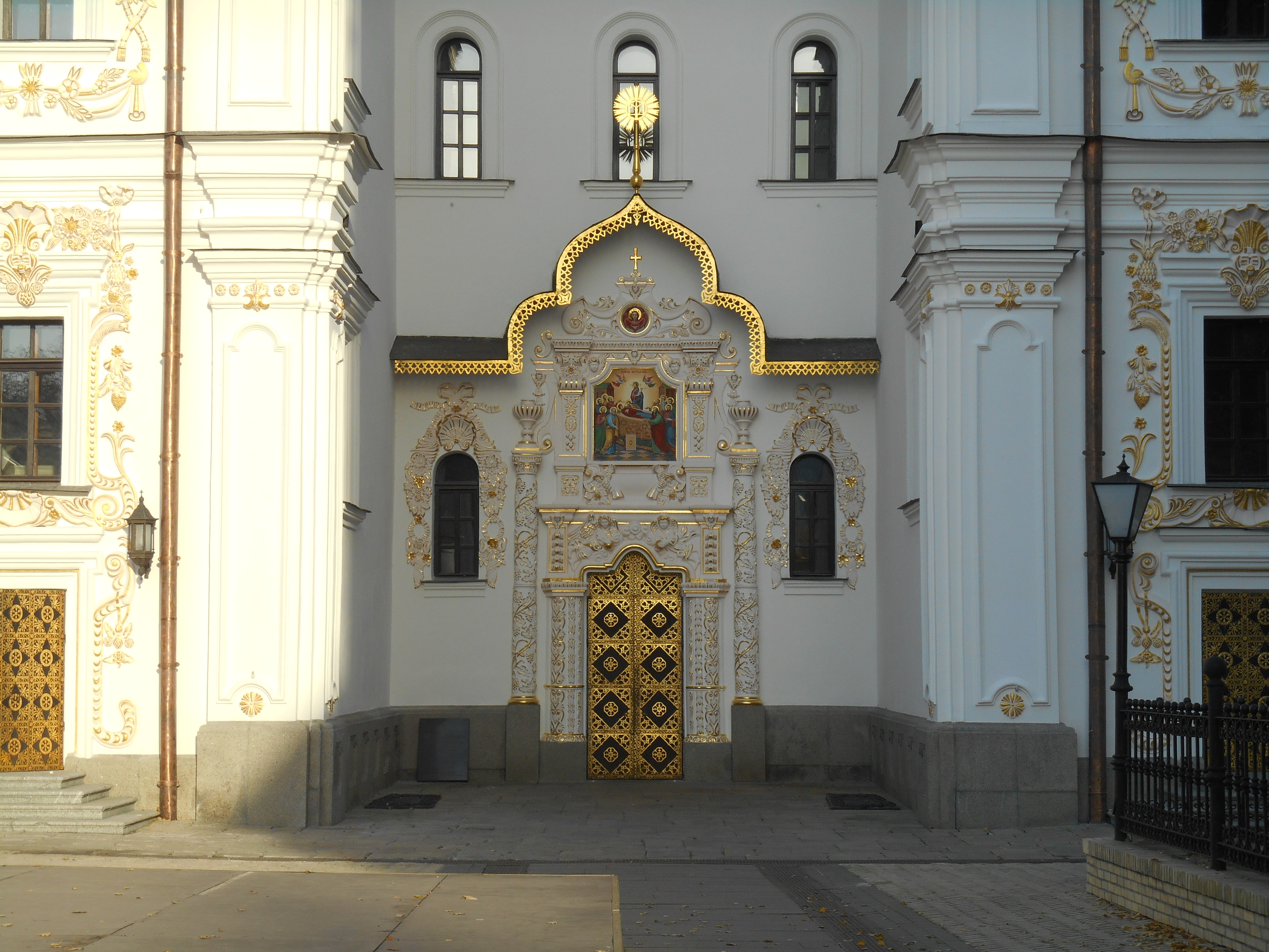 Собор Успенський (руїни), Київ, Лаврська вул., 9